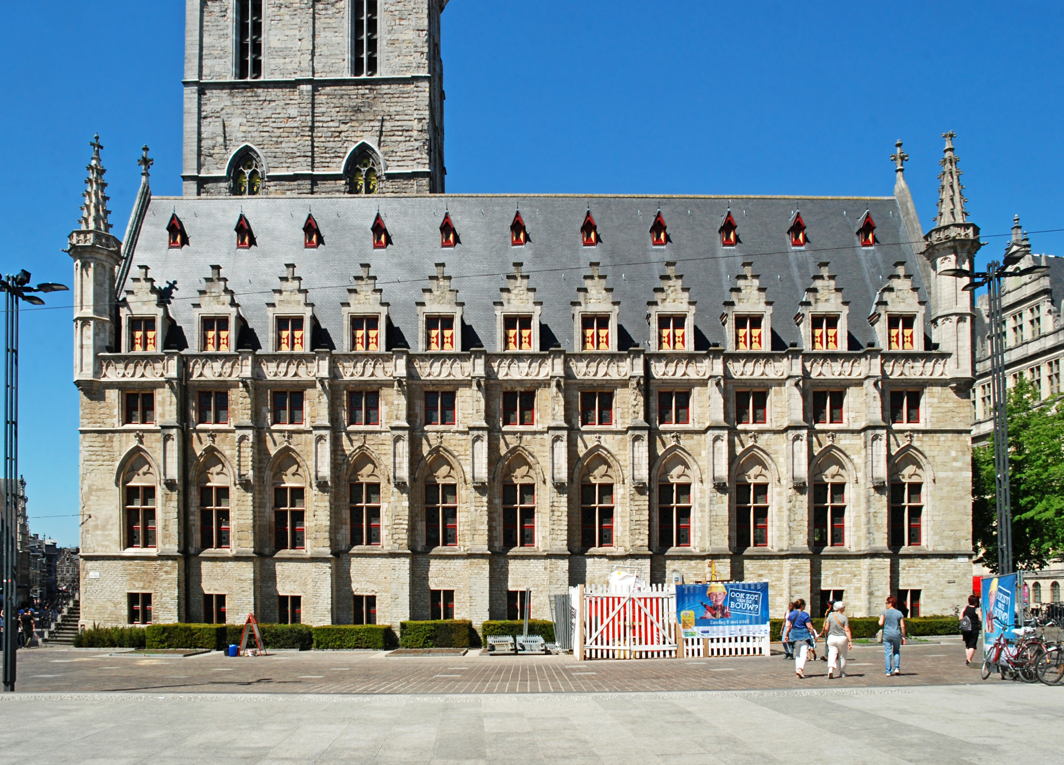 Belgique - Gand - Halle aux Draps (Lakenhalle, style gothique, 15e siècle)